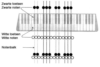 uitleg Klavarnotatie